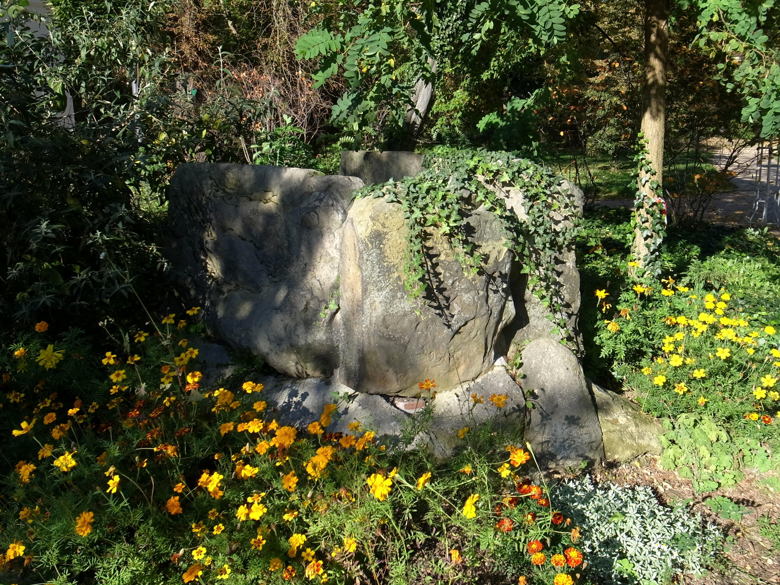 Köthen, Steinkiste Plömnitz, Grabmal im Schlosspark. Wiederaufgebautes Steinkistengrab, Originalstandort war in Plömnitz.